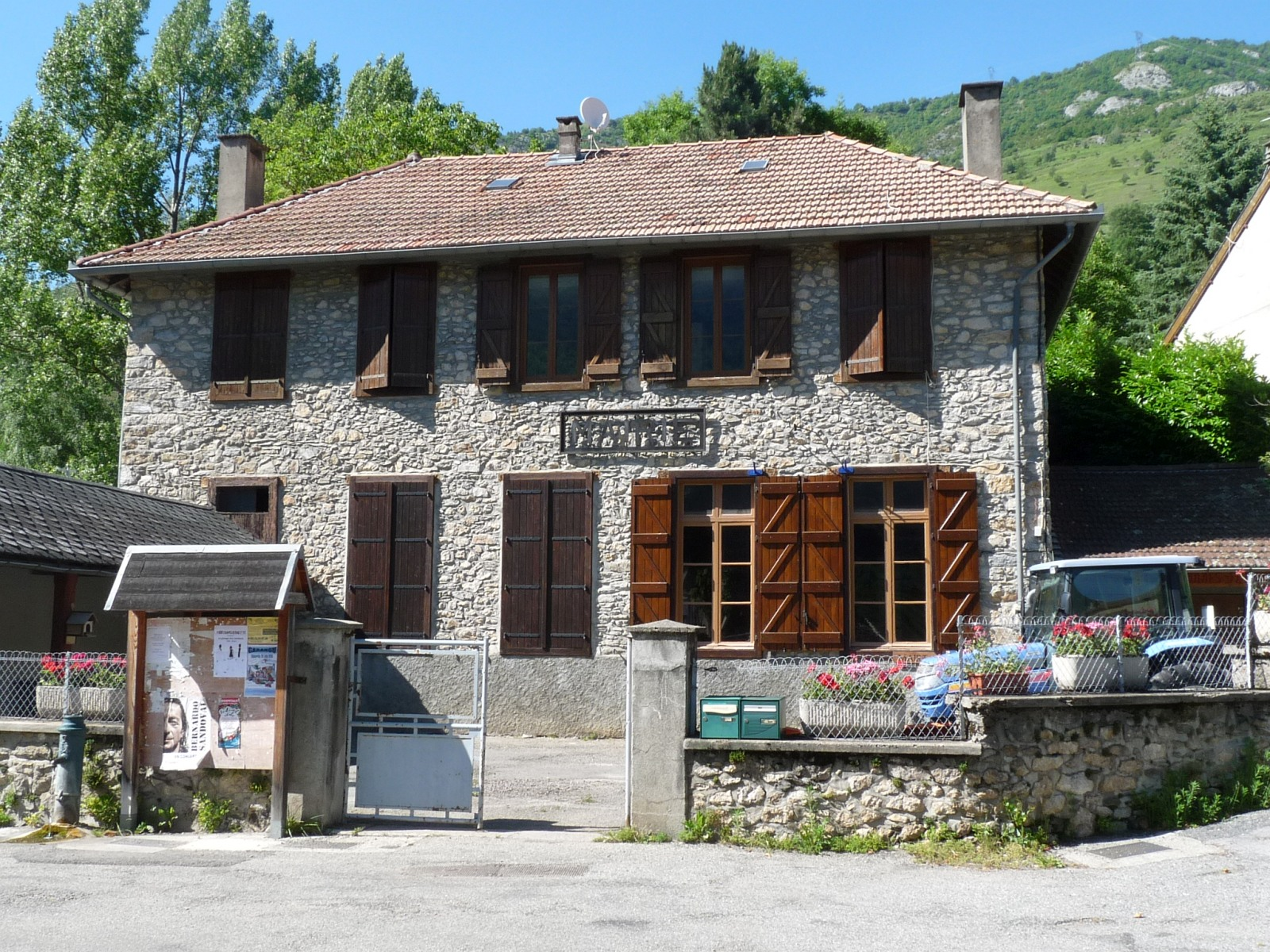 Mairie d'Unac, Ariège, France